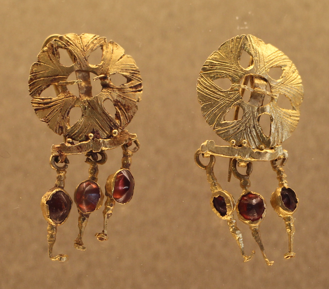 Museo archeologico nazionale G.A. Sanna - MIBAC The making of this document was supported by Wikimedia CH. (Submit your project!) For all the files concerned, please see the category Supported by Wikimedia CH. This is a photo of a monument which is part of cultural heritage of Italy.